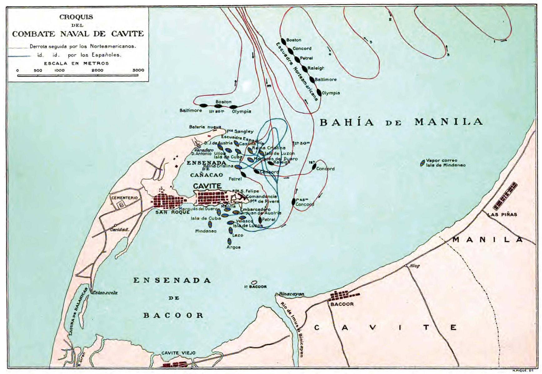 Схема сражения в Манильской бухте 1 мая 1898 г.